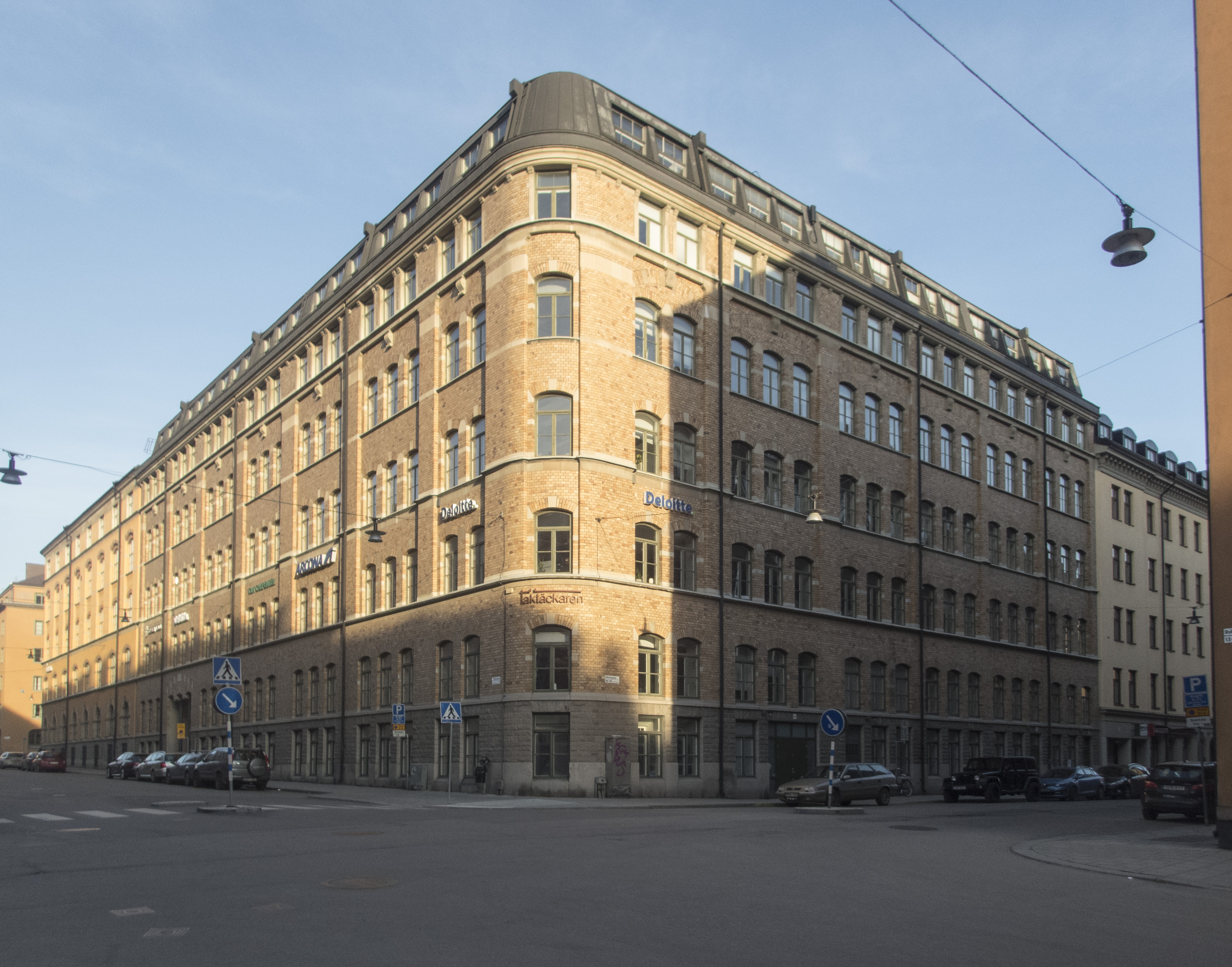 Taktäckaren 2, Döbelnsgatan-Rehnsgatan Nybyggnadsår 1906 - 1908 Björn Harald Svensson (Arkitekt)